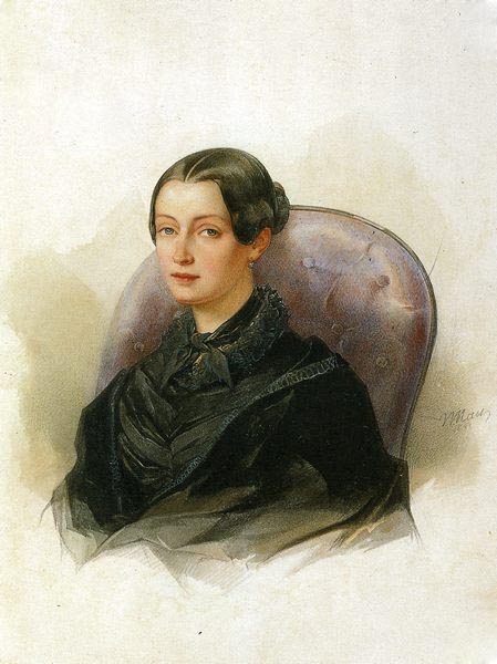 Мария Константиновна Бенкендорф (1818 - 31.10.1844), c 1835 года замужем за Павлом Матвеевичем Голенищевым-Кутузовым-Толстым (1800-1883).